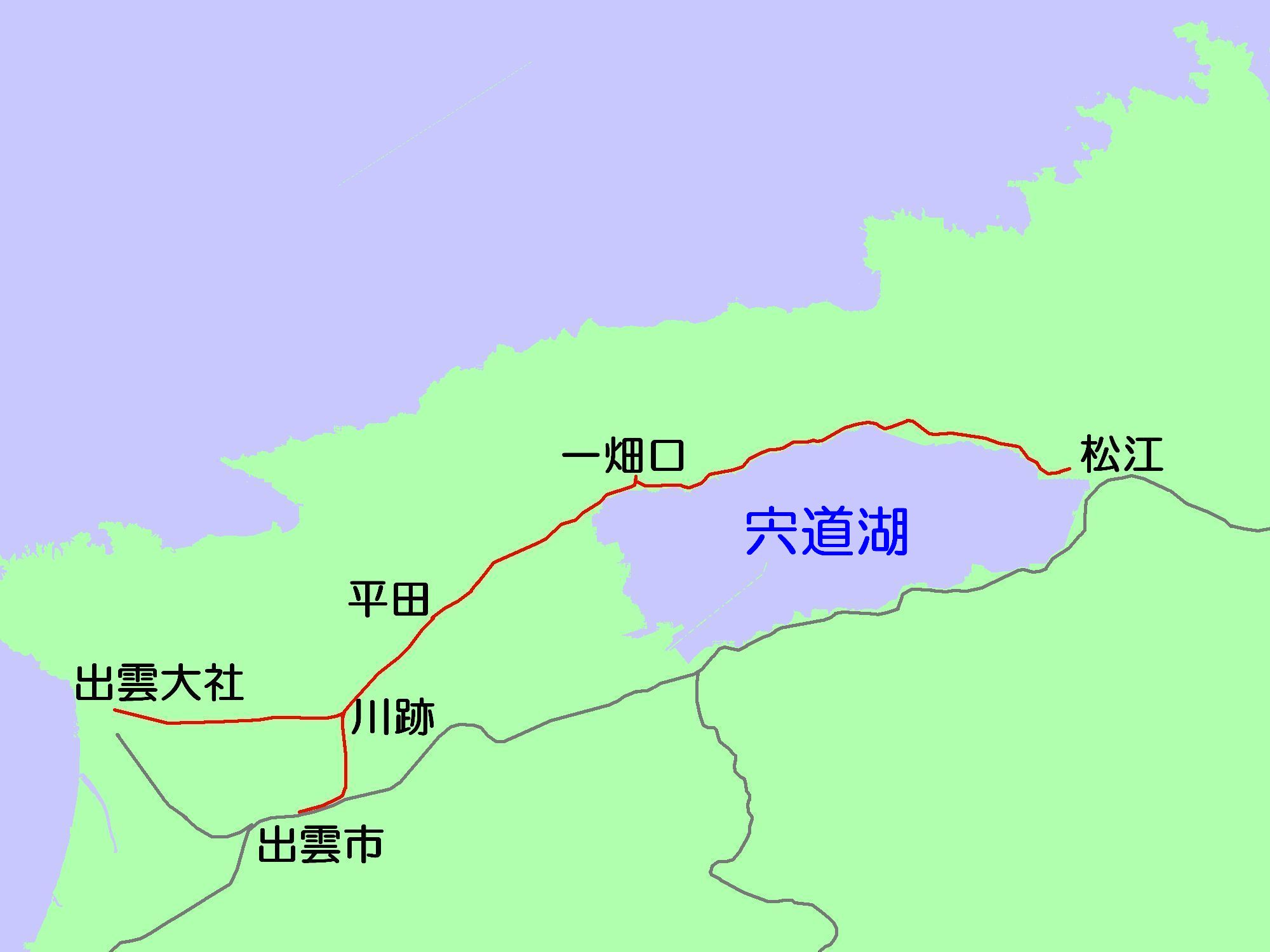 1960年頃の一畑口～一畑間が廃止されたころの路線図。赤い線が一畑電気鉄道、グレーの線は国鉄線。